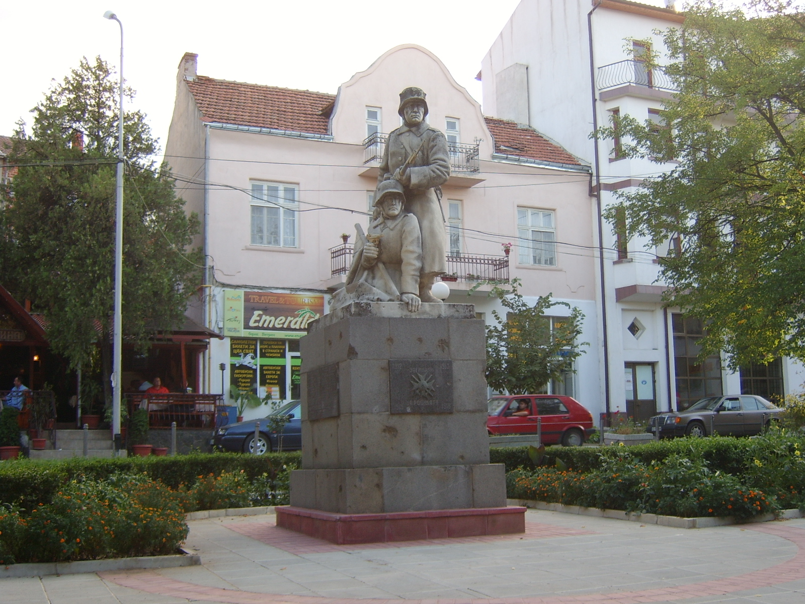 Monument in Petrich, Bulgaria